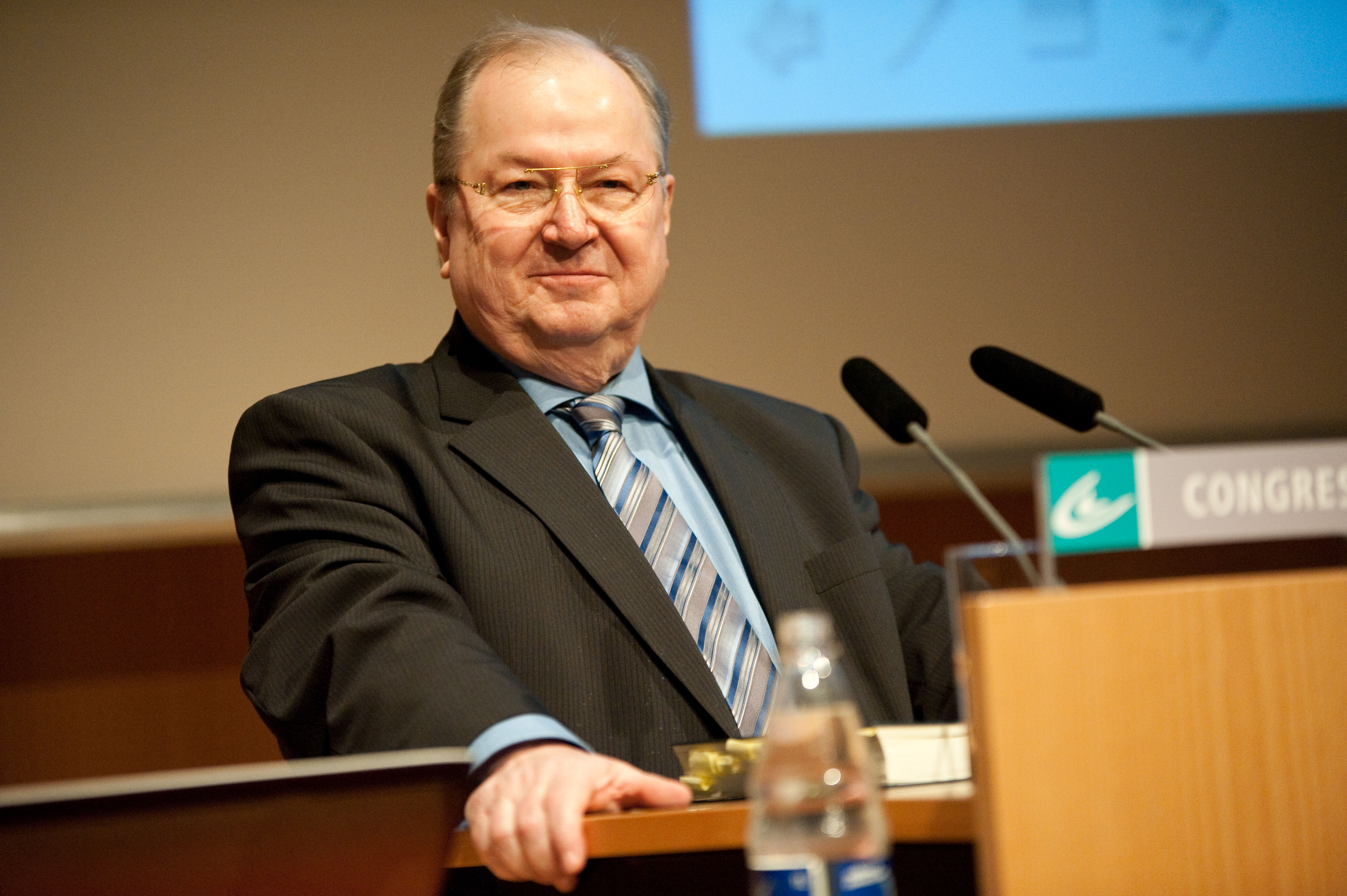 Berlin-Neuköllns Bürgermeister Heinz Buschkowsky am 18. Januar 2013 auf dem Kongress christlicher Führungskräfte in Leipzig.